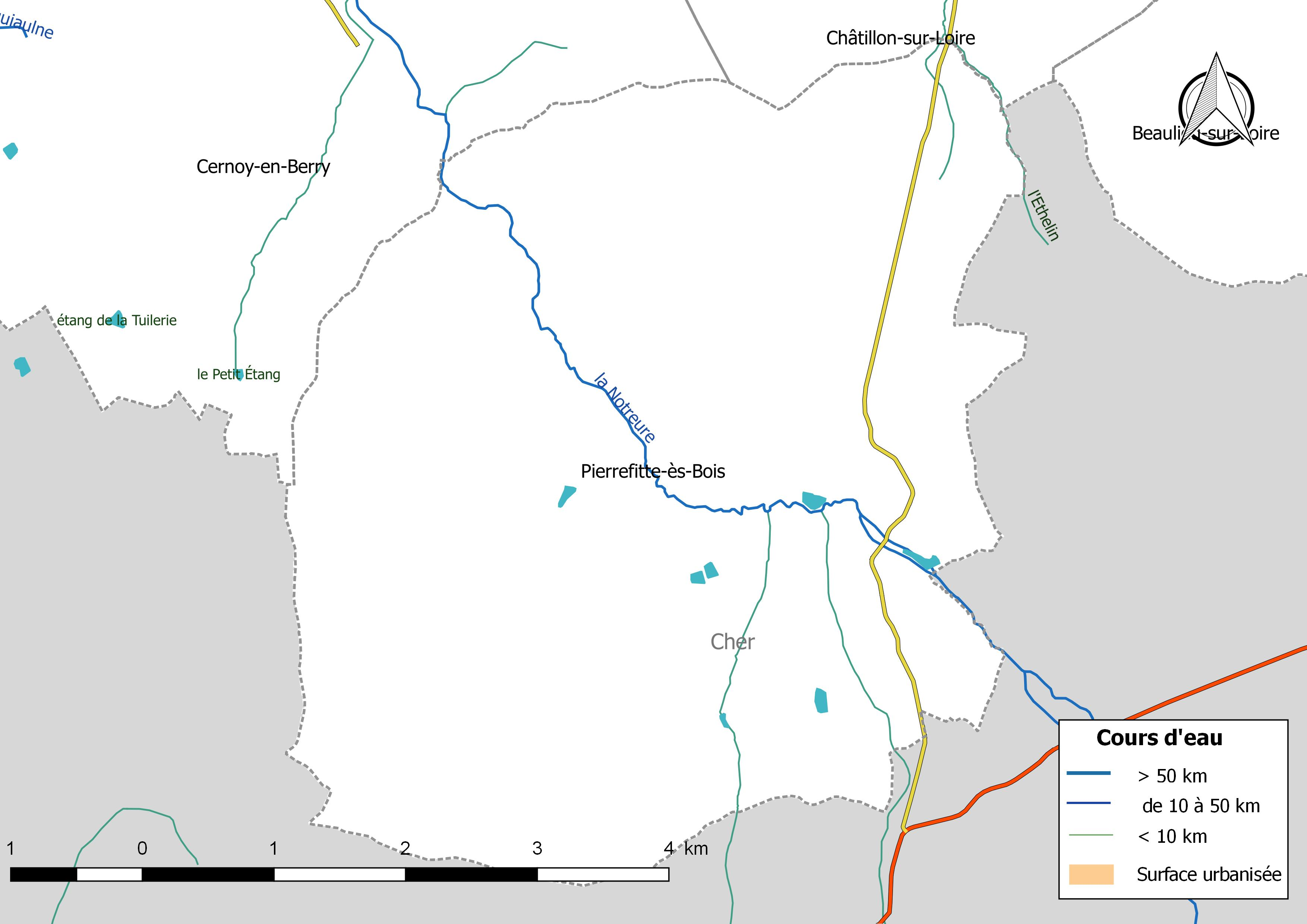 Carte du réseau hydrographique de la commune de Pierrefitte-ès-Bois (France).